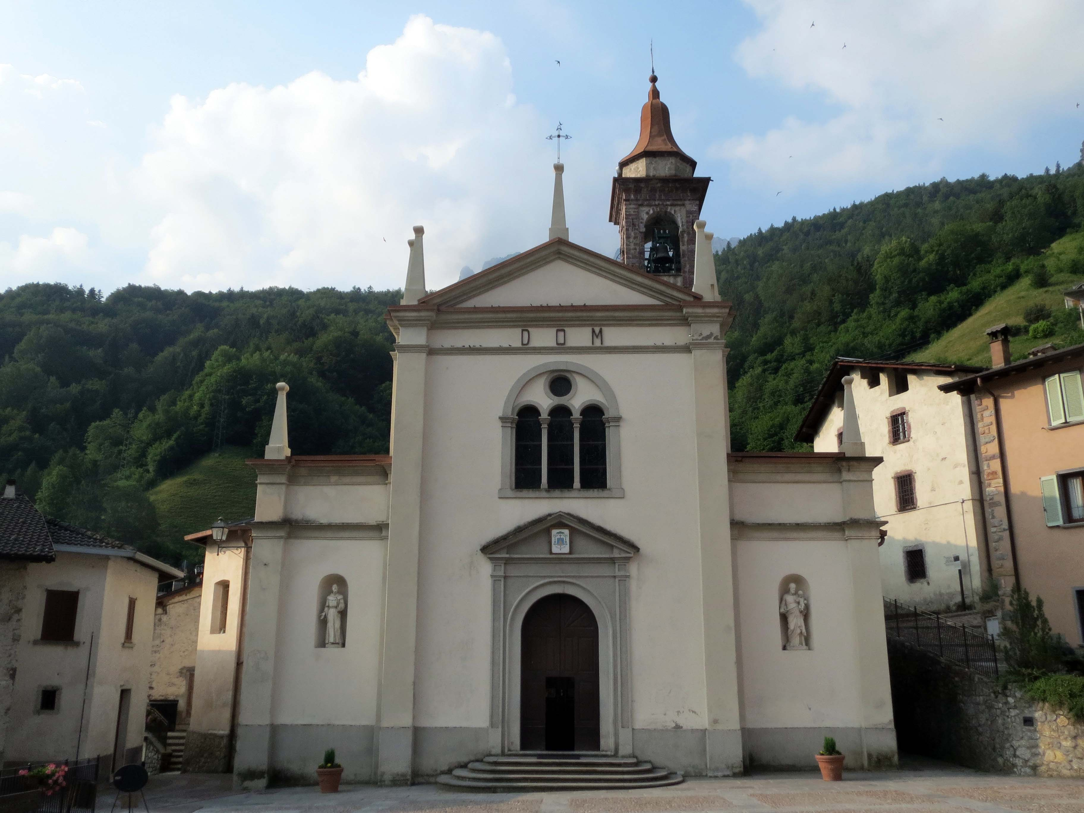 Parrocchiale